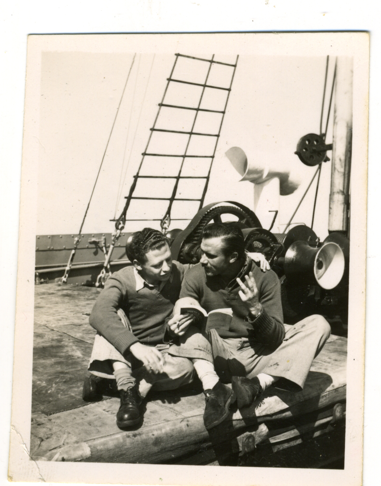 יונה ז'באן וצבי כרמל על סיפון האוניה "בהירה", 03/1949